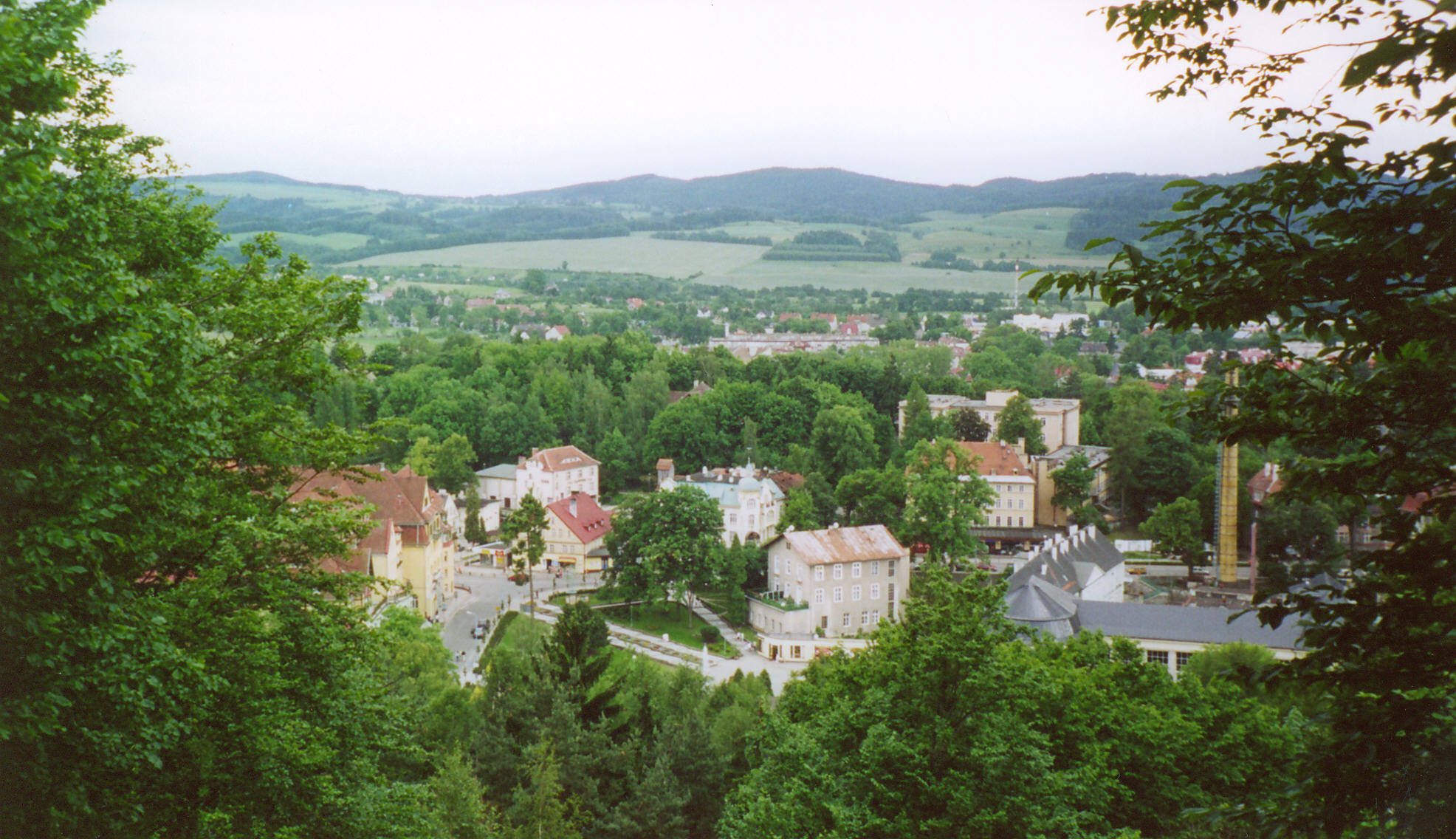 Kudowa-Zdrój (Bad Kudowa): Aussicht vom Schlossberg aus in Richtung Adlergebirge